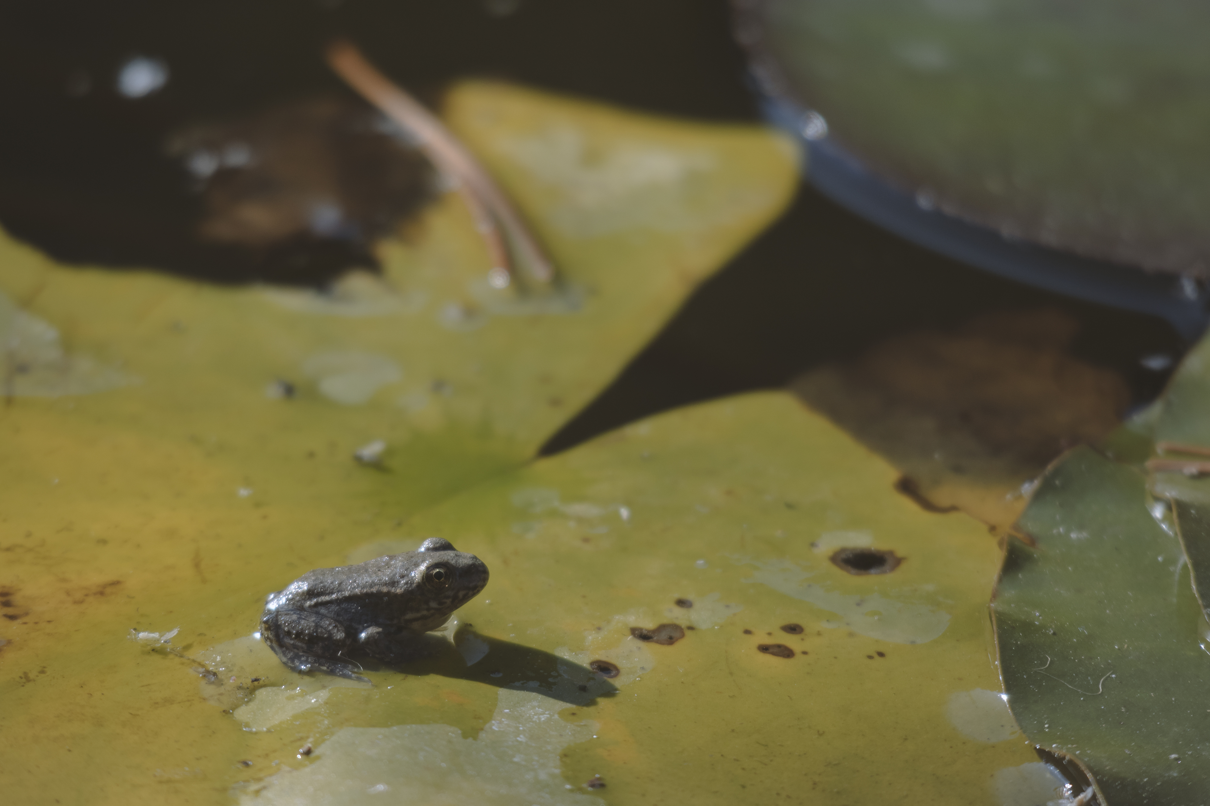 الحيوانات وتسمى أيضًا باسم "المَتْزَوِيّات" أي الحيوانات عديدة الخلايا. هي كائنات حقيقيات النوى ومتعددة الخلايا تشكل المملكة البيولوجية الحيوانية.